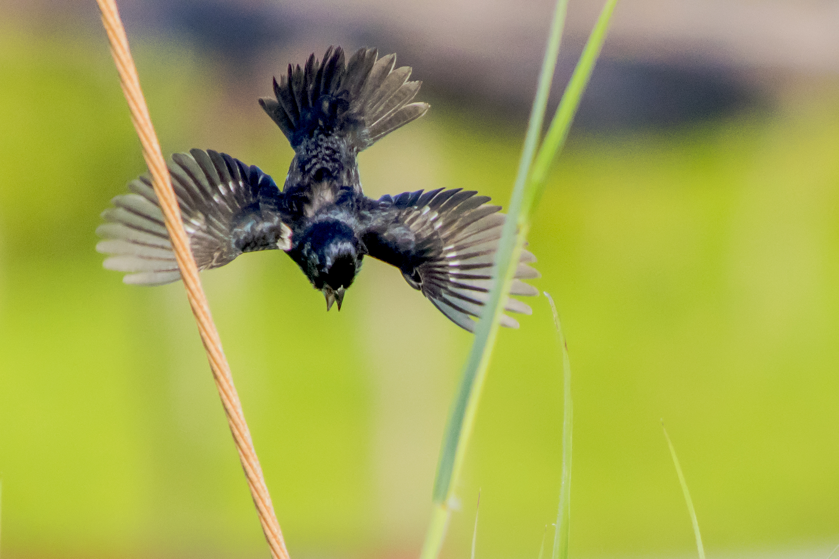 Tiziu em seu salto nupcial.